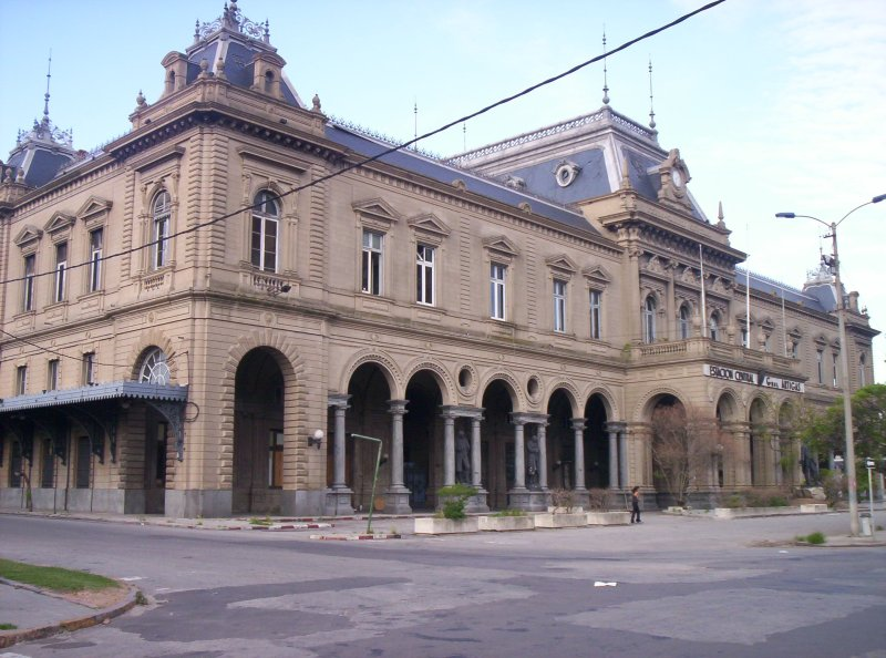 Estación Central de ferrocarriles "General Artigas" en Montevideo, Uruguay.